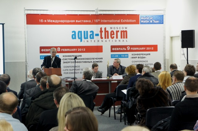 Конференция в рамках выставки